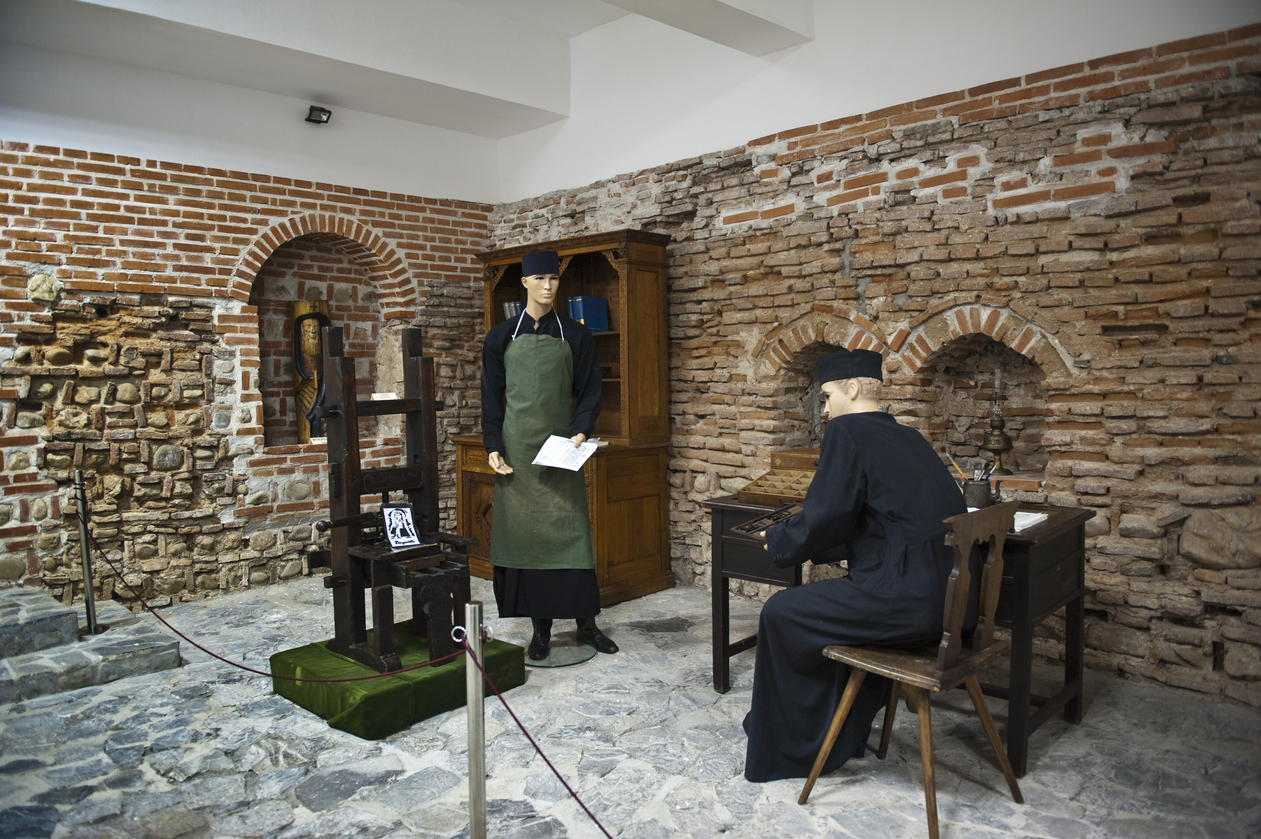 Muzeul Tiparului și Cărții Vechi Românești